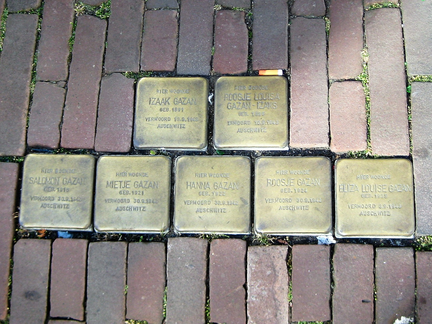 Stolpersteine Nobelstraat 10, Brielle